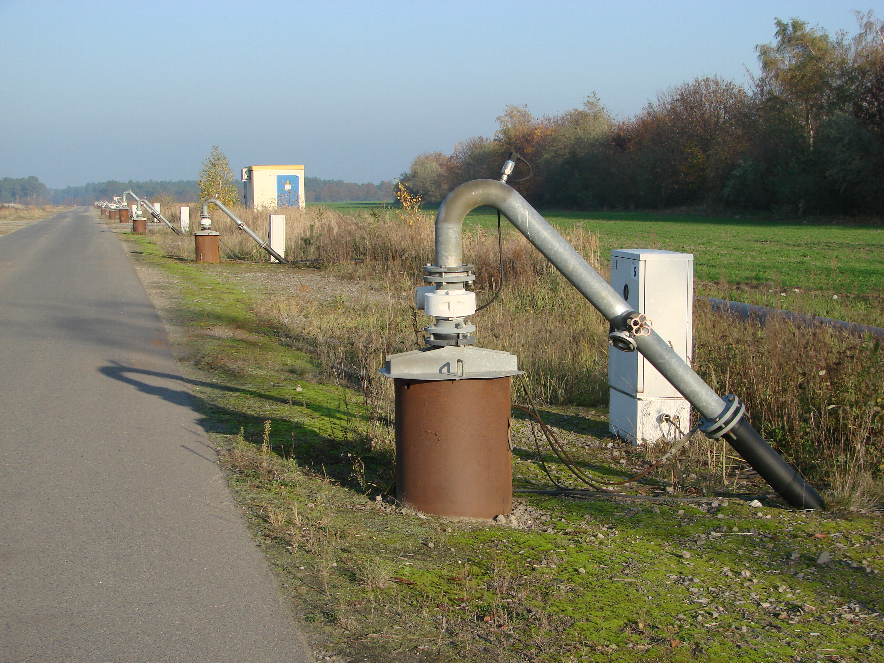 Entwässerungsbrunnen am Tagebau Jänschwalde in Höhe des Aussichtspunktes am Dorf Grießen (Gemeinde Jänschwalde)